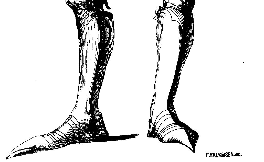 Plate sabatons